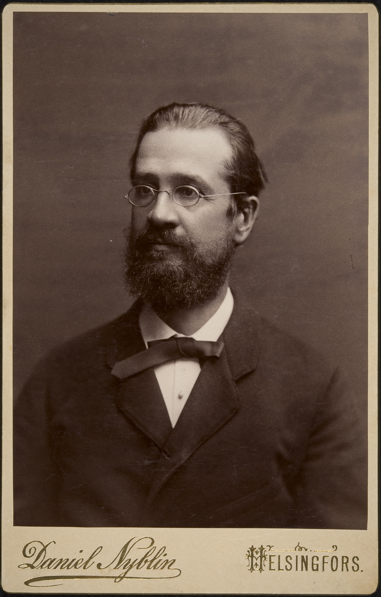 Julius Krohn, kirjallisuuden ja kansanrunouden tutkija, runoilija